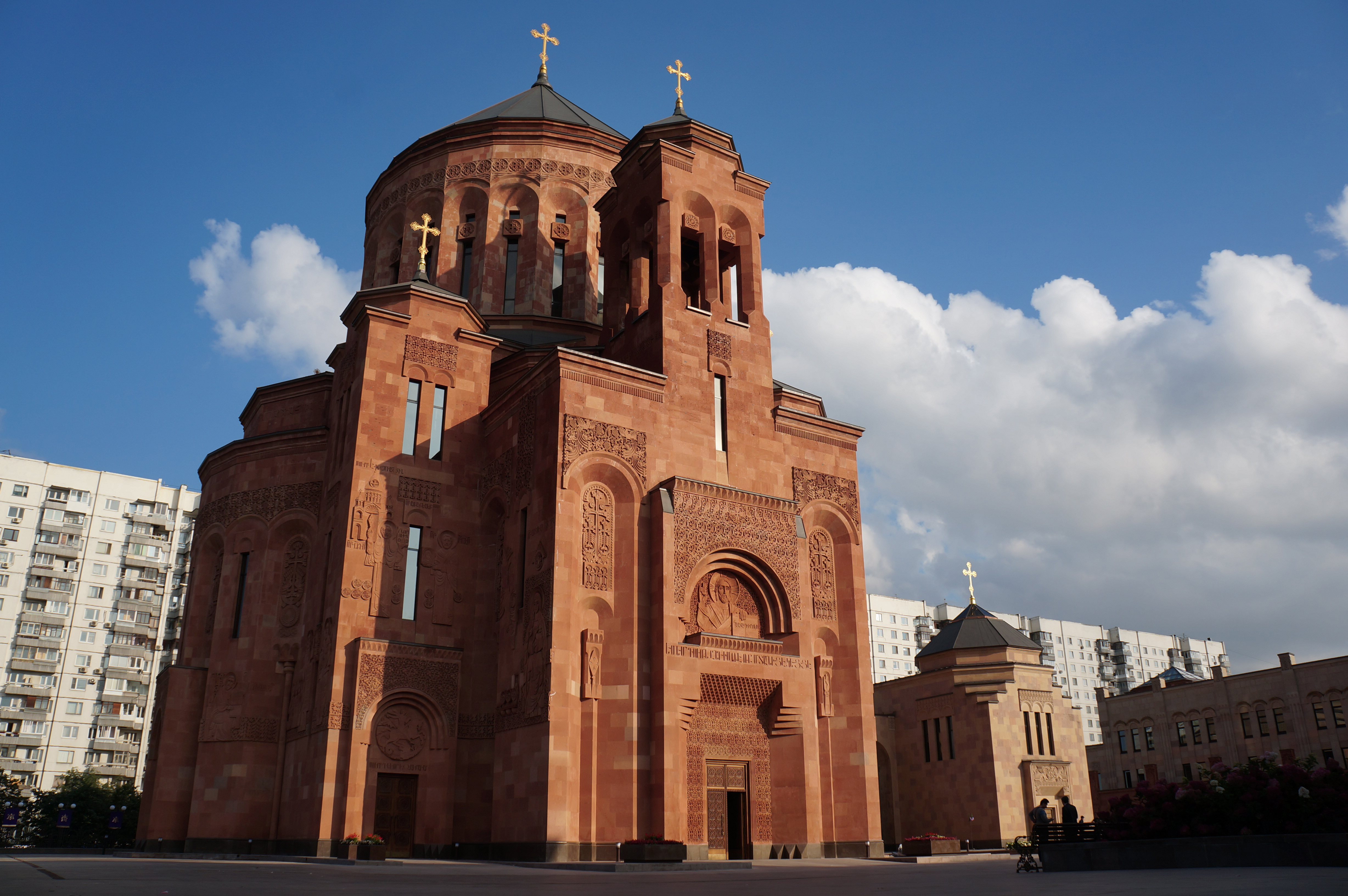 Սբ. Պայծառակերպության եկեղեցին և Սբ. Խաչ մատուռը Մոսկվայում